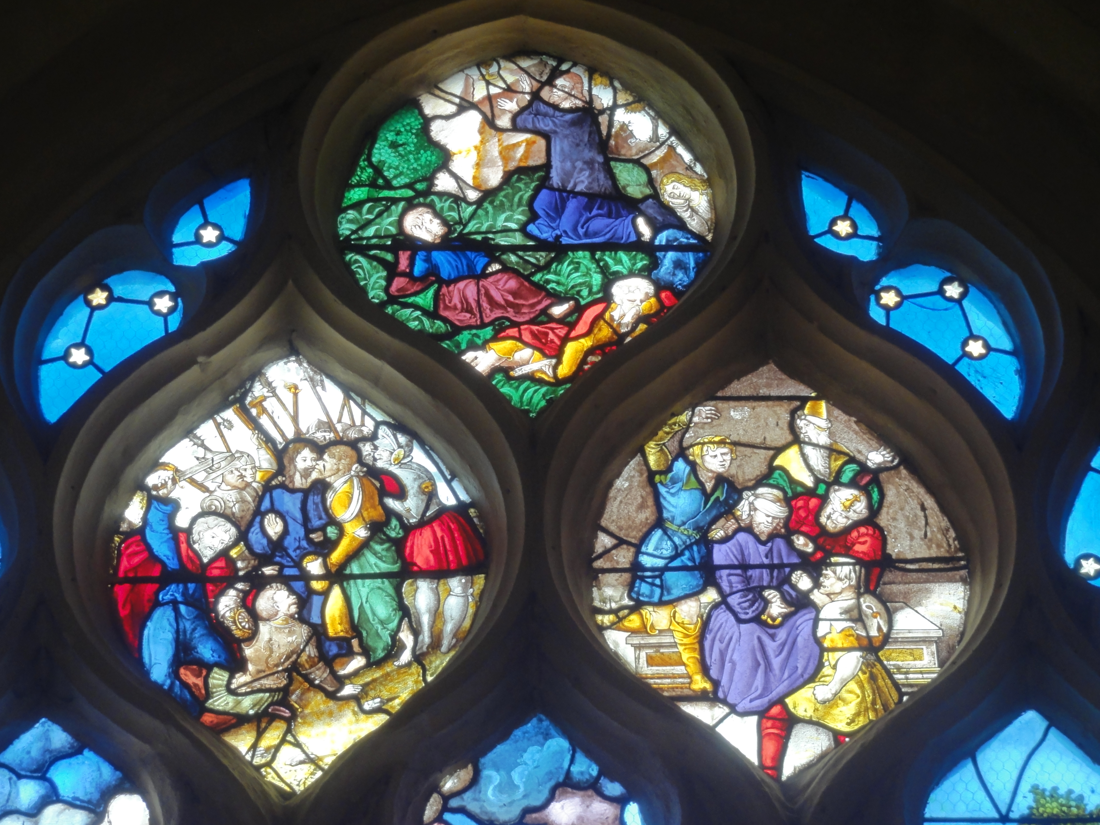 Verrière de la Crucifixion du Christ.